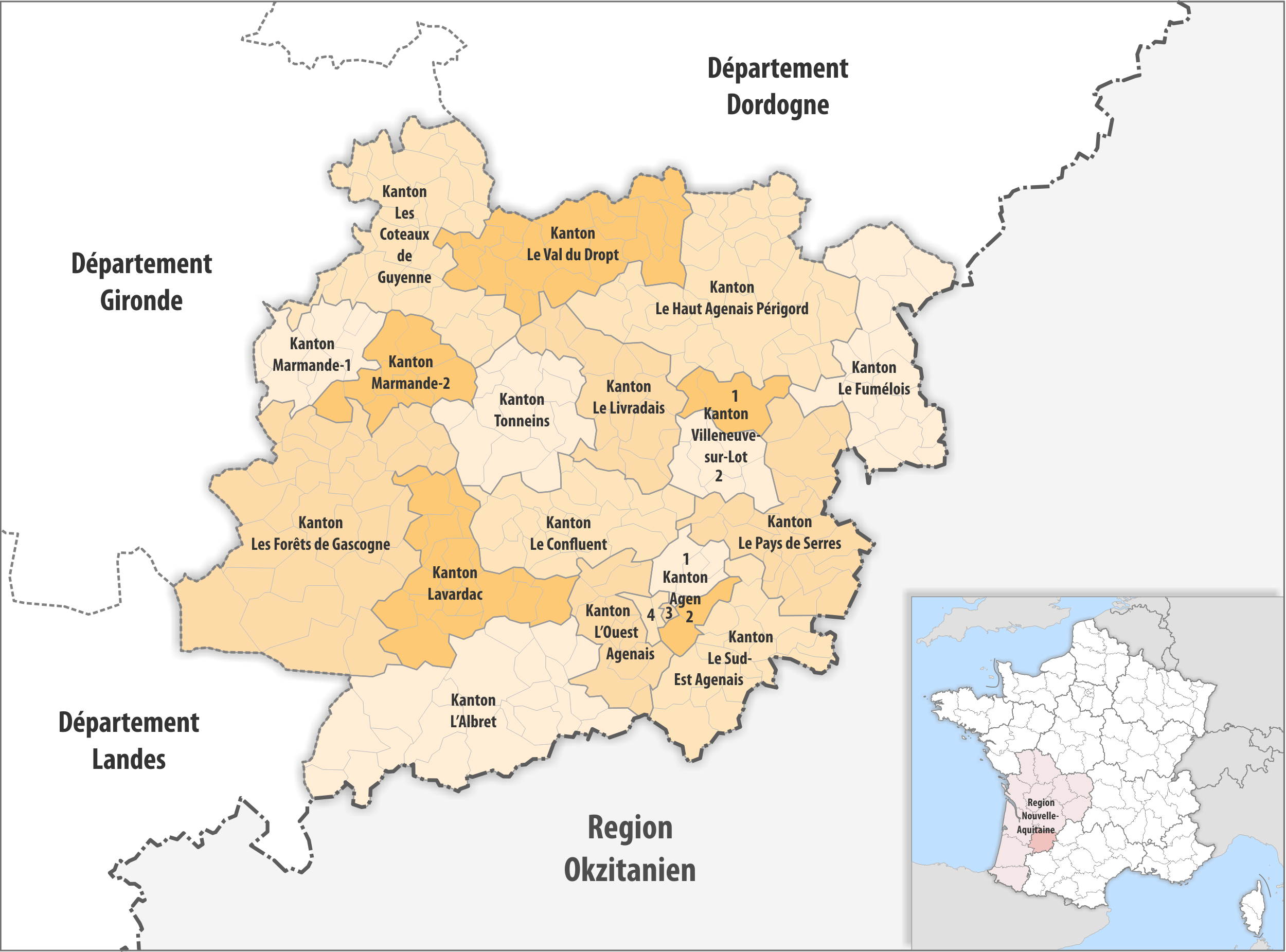 Gemeinden und Kantone im Departement Lot-et-Garonne